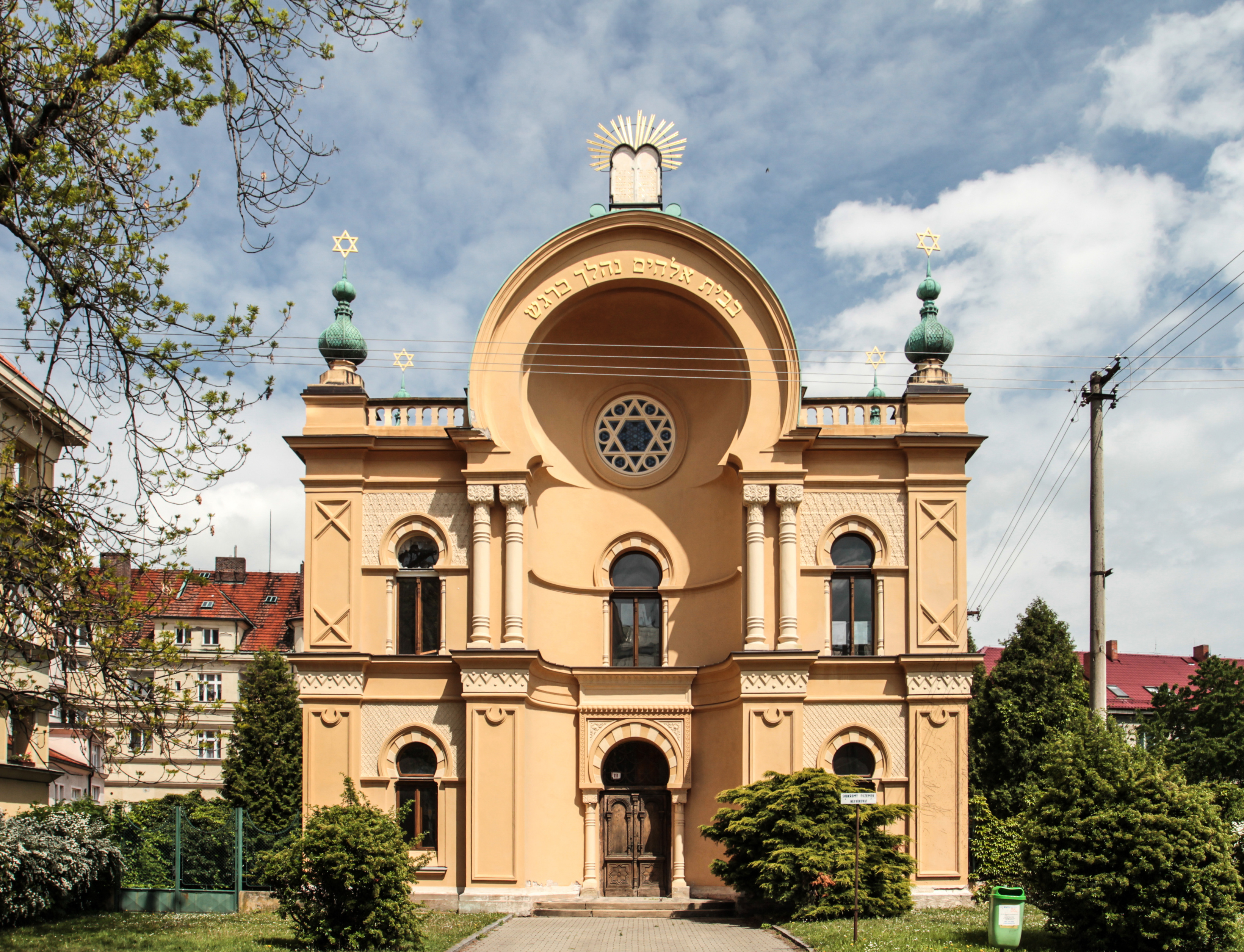 Synagoga, Masarykova 111/29, Čáslav-Nové Město, Čáslav. Upravena kolinearita.